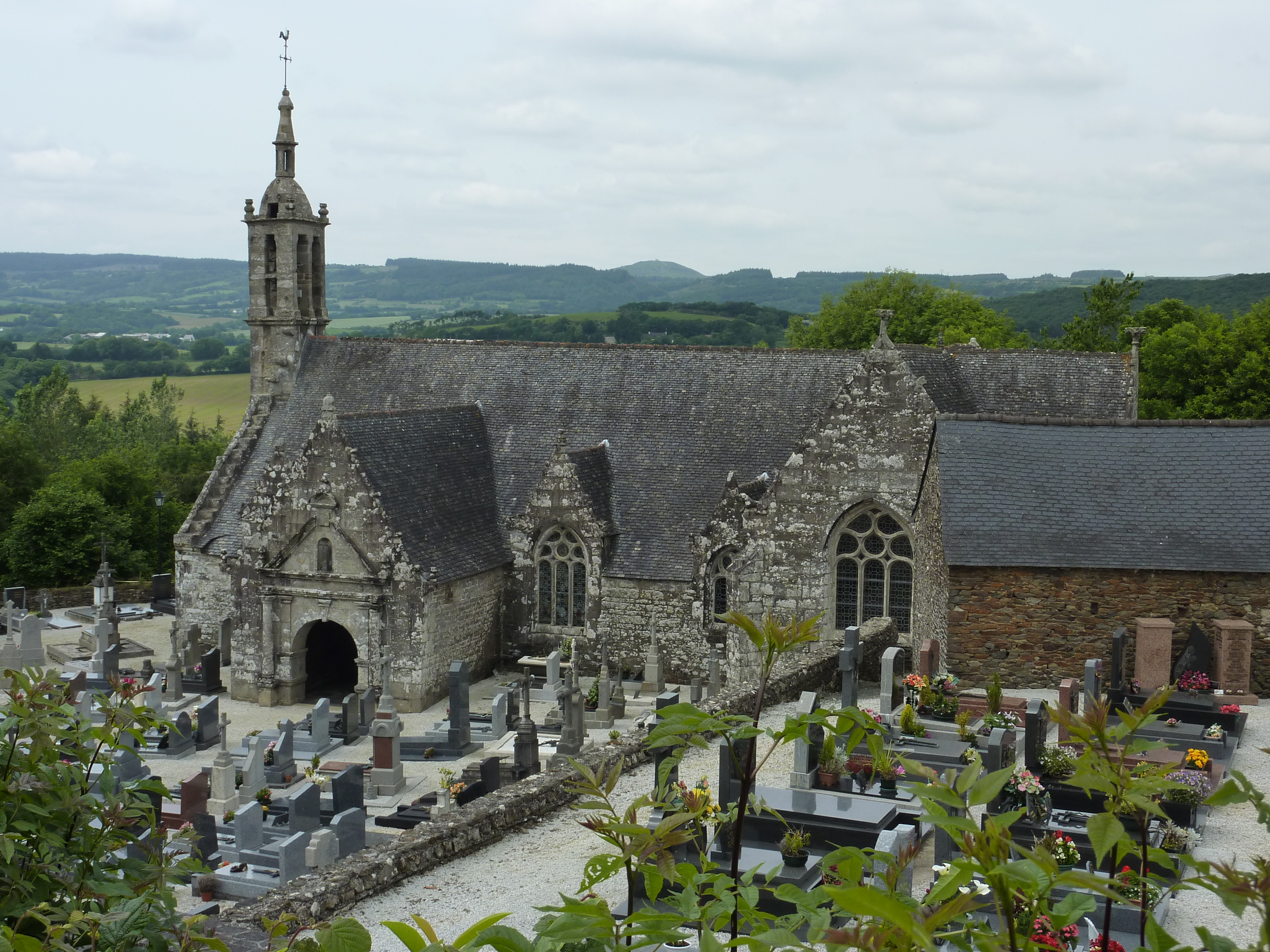 Lannédern: l'enclos paroissial, vue d'ensemble. A l'arrière-plan, les Monts d'Arrée et le mont Saint-Michel-de-Brasparts